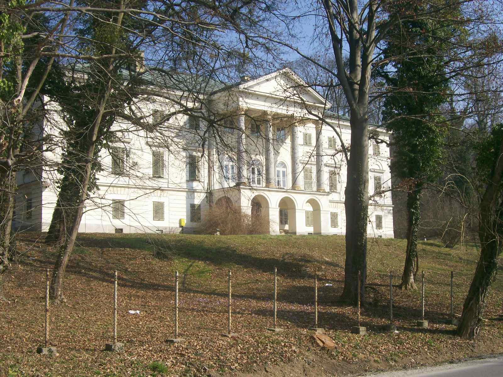 Dvorac Januševec nedaleko od Zaprešića (Prigorje Brdovečko)